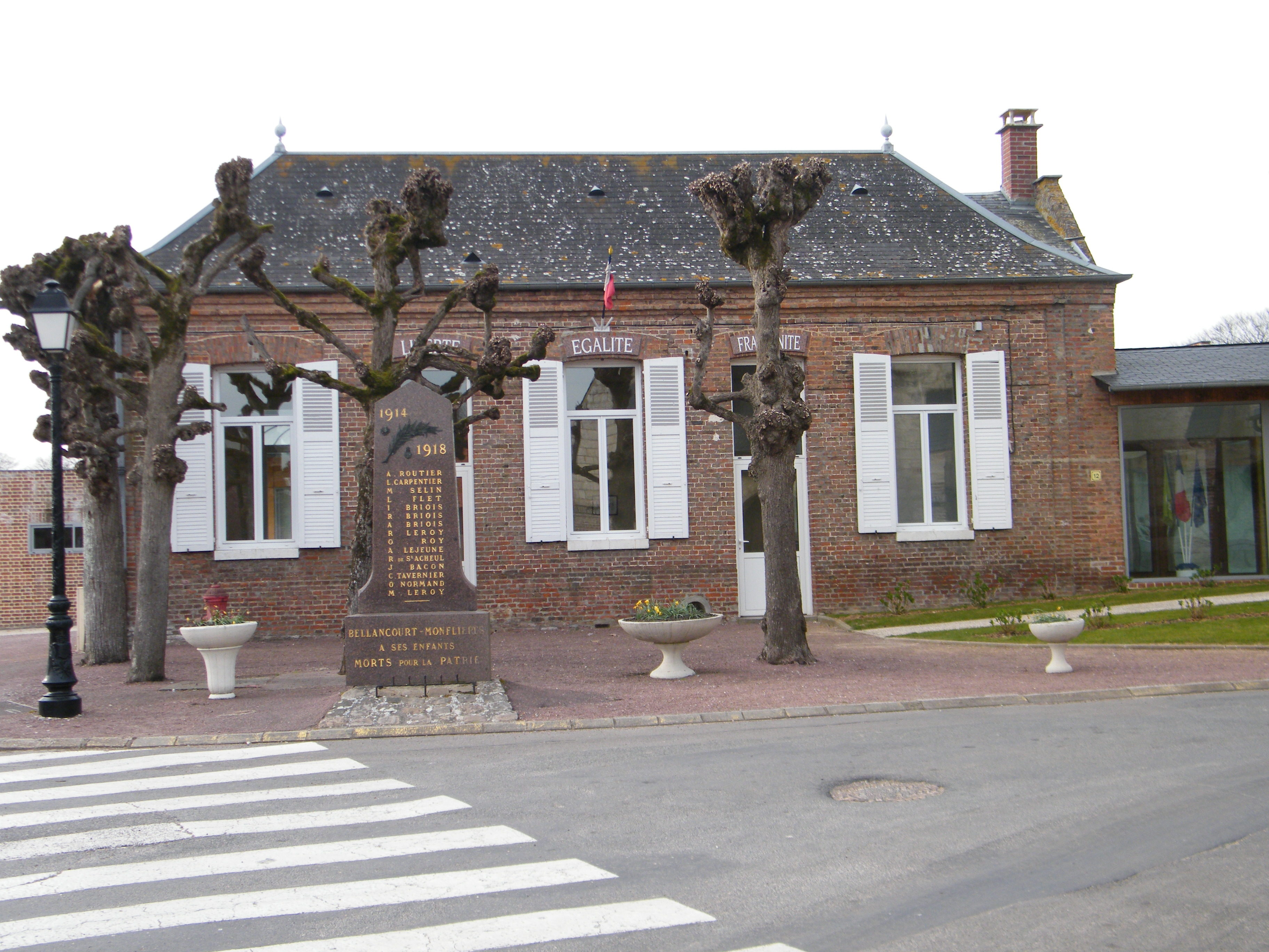 La mairie.